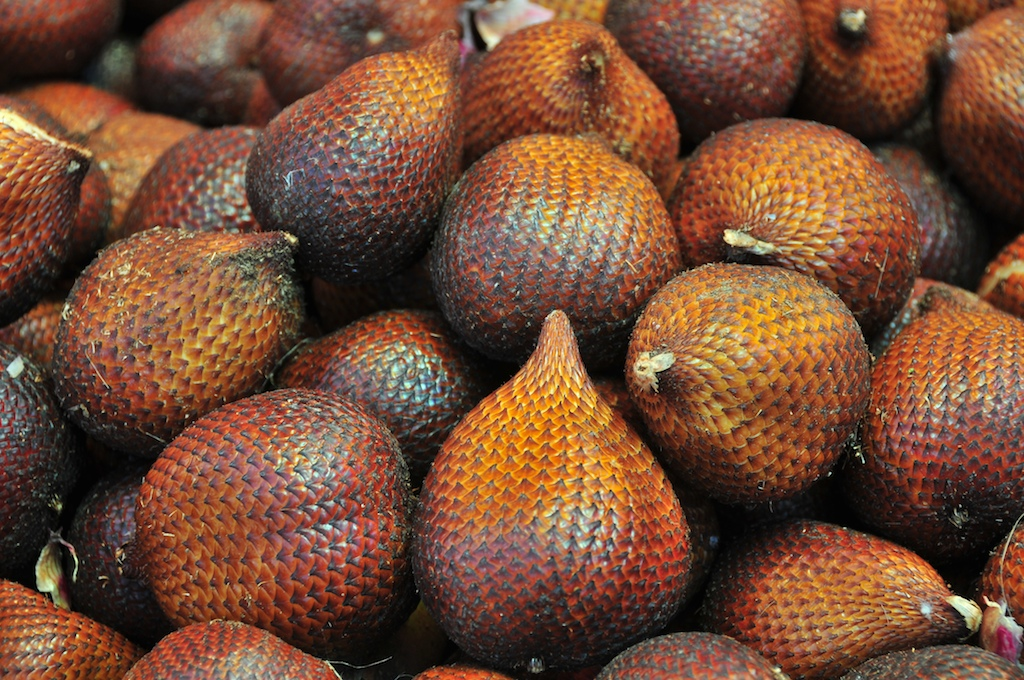 Salak fruits (Salacca zalacca).